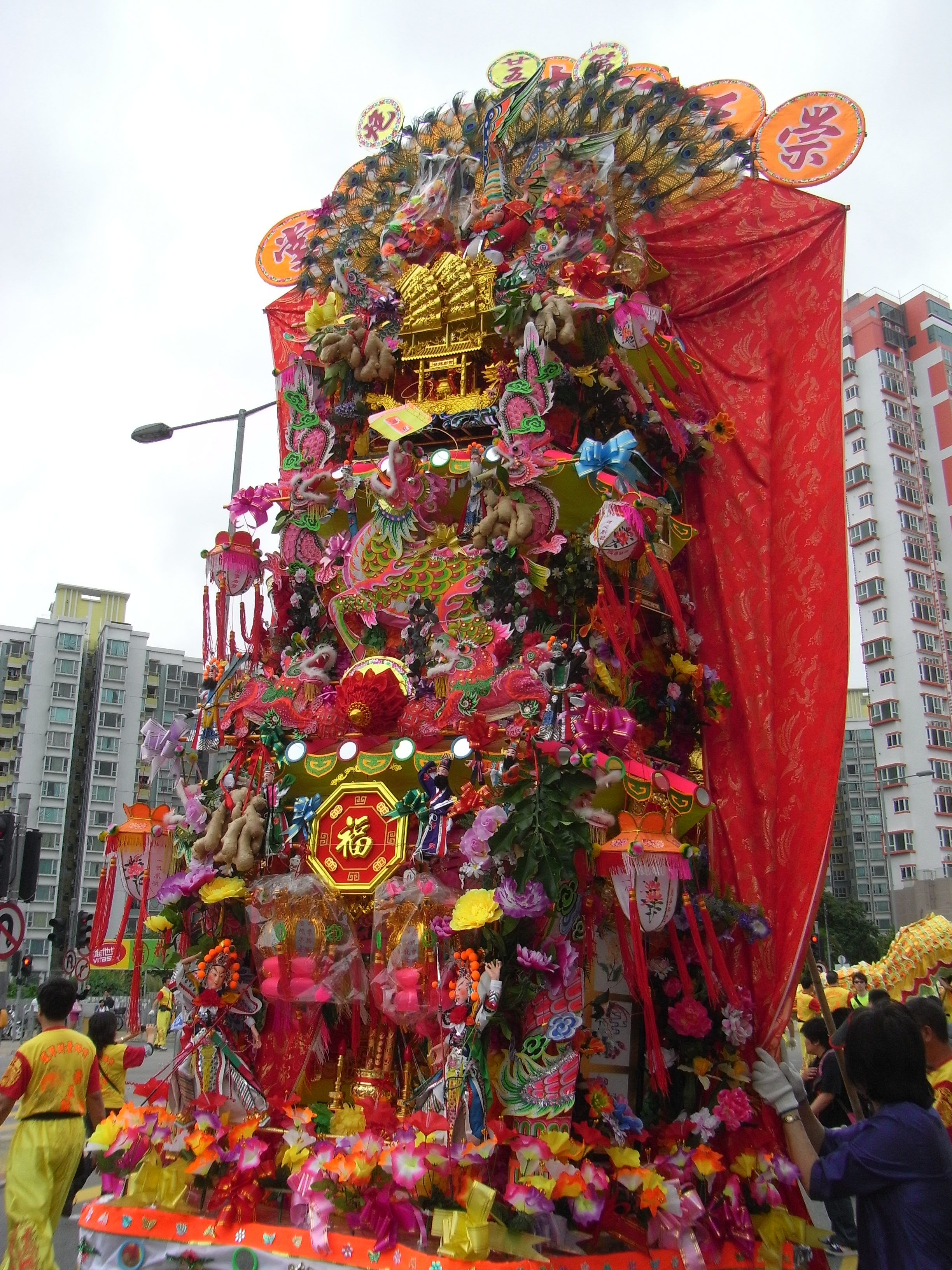 花炮，元朗十八鄉天后誕，崇正新村 Tin Hau Festival, in Shung Ching San Tsuen, Yuen Long District, Hong Kong